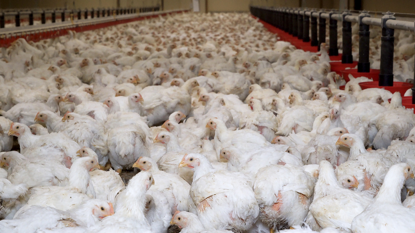 Image prise dans un élevage de poulets Maître Coq (France)